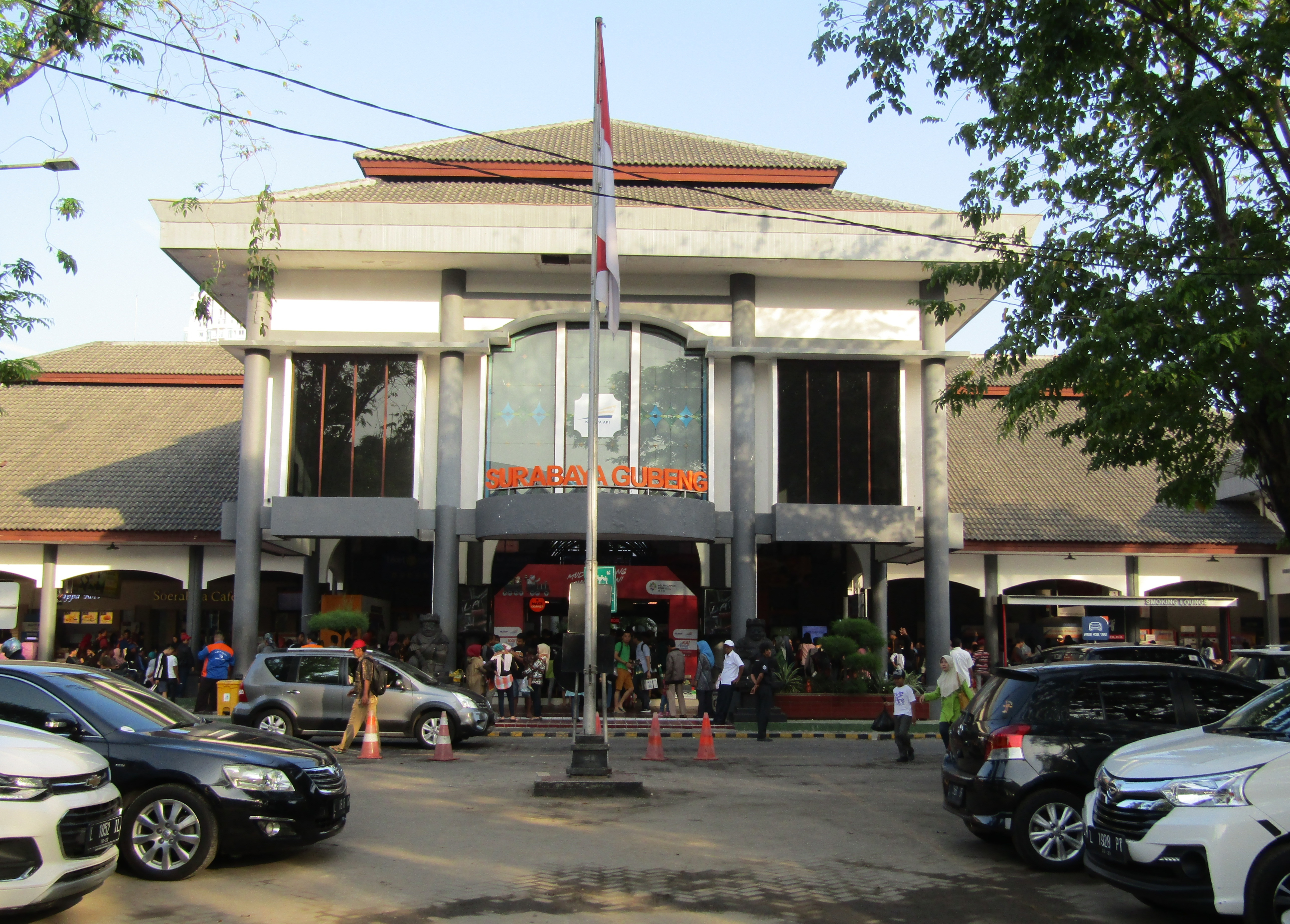 Bangunan baru Stasiun Gubeng.